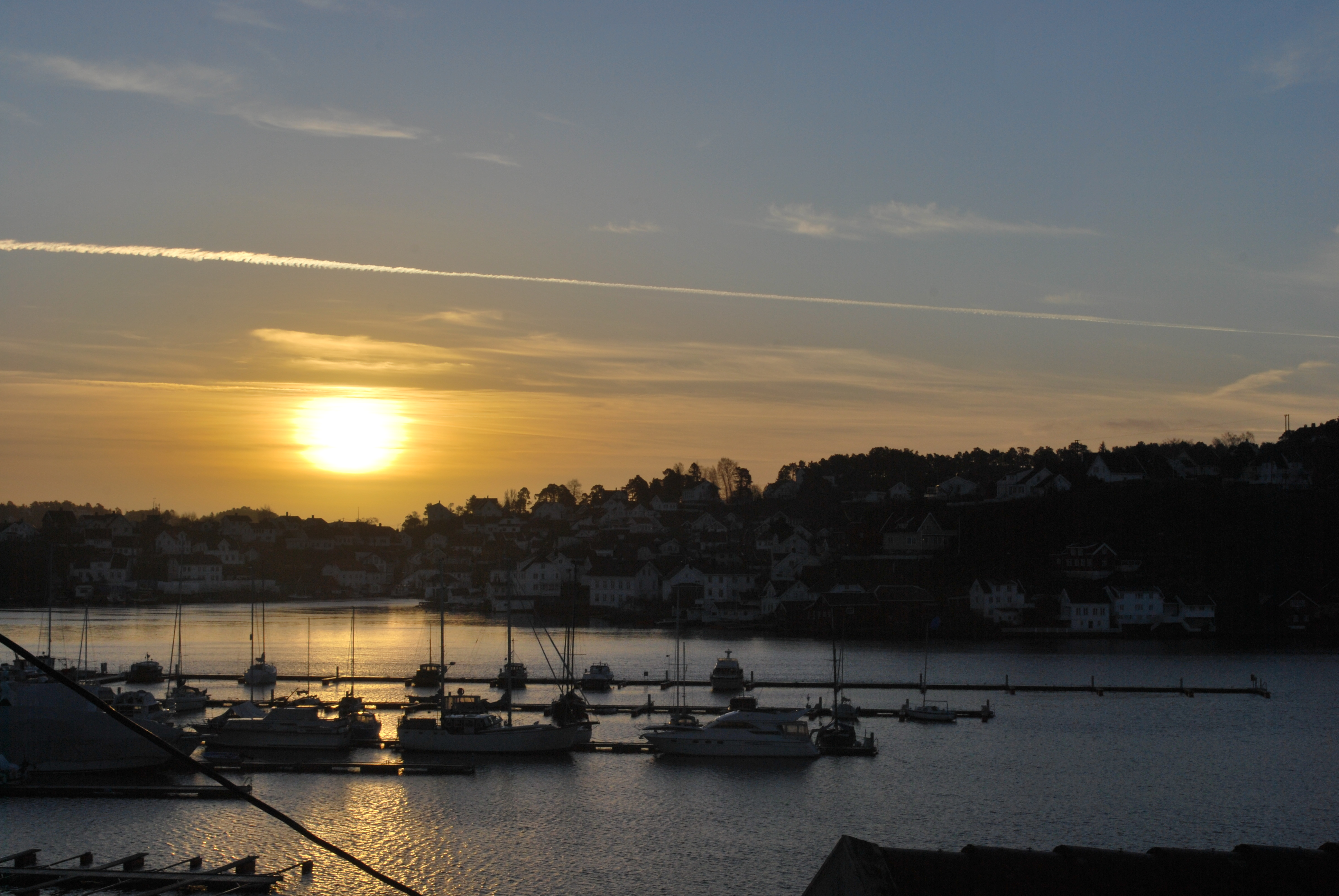 Kolbjørnsvik